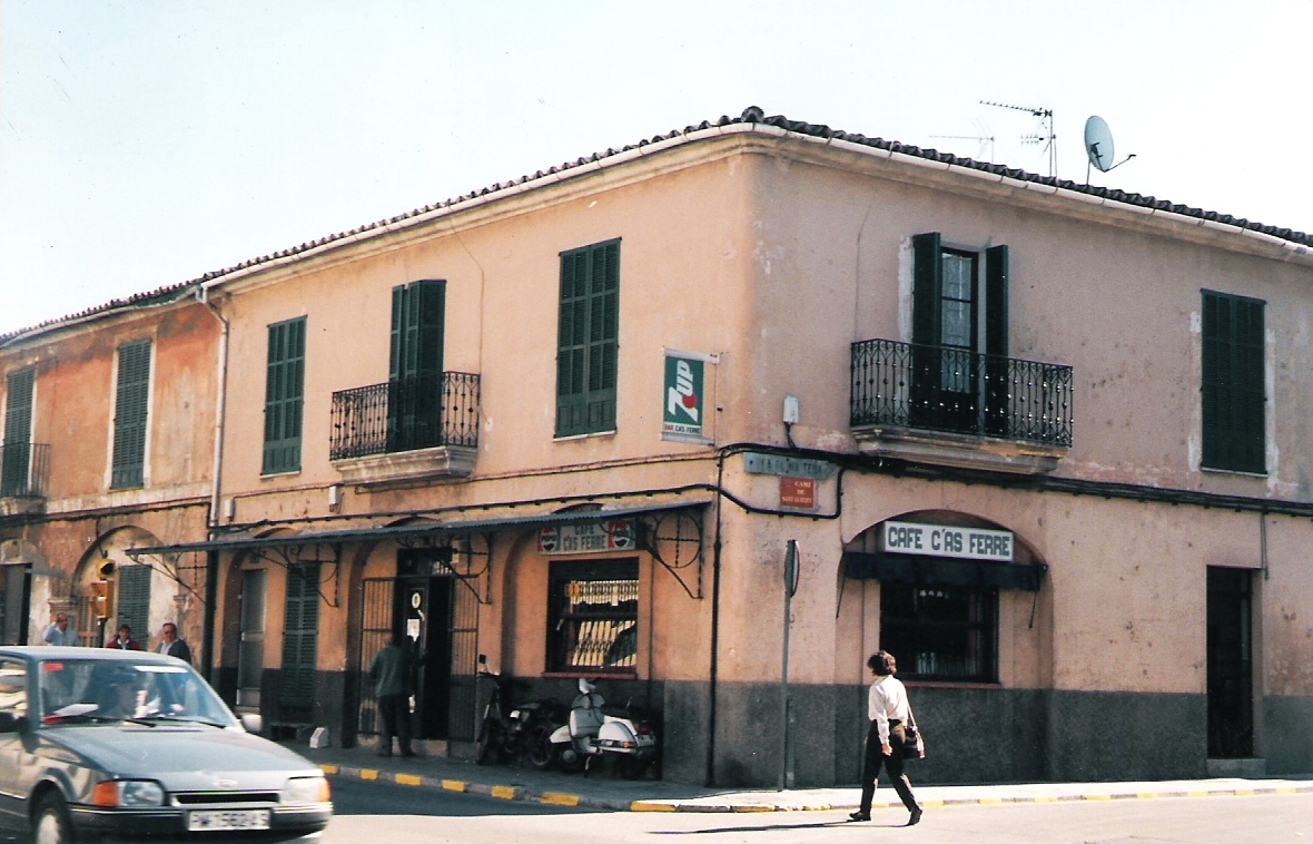 Cas Ferre, antiguo hostal del Pont d'Inca